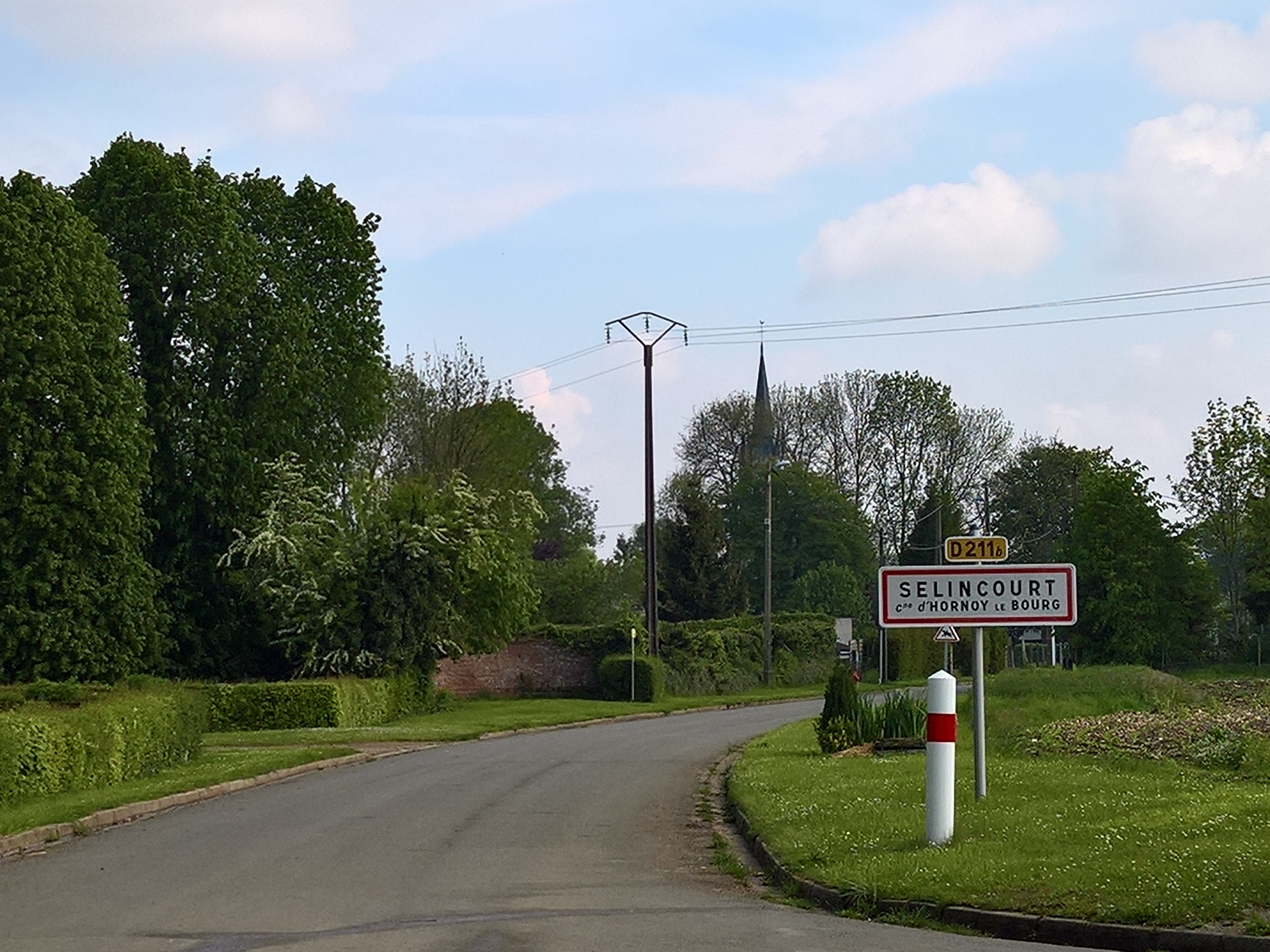 Hornoy-le-Bourg : Hameau de Selincourt : Entrée de village